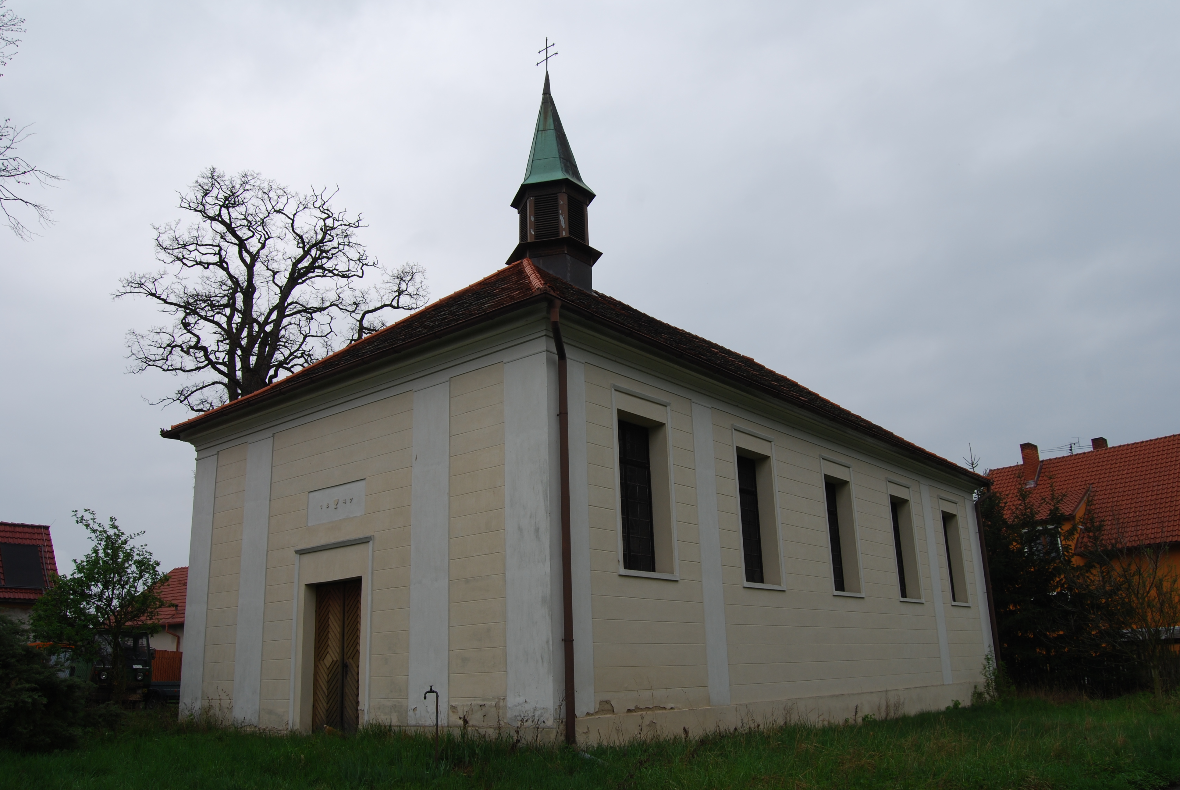 Budova bývalého evangelického kostela ve vesnici. Rybníky (okres Příbram). Česká republika. - Google Maps - Google Earth